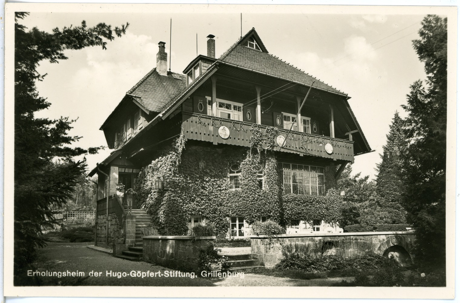 Grillenburg; Erholungsheim der Hugo-Göpfert-Stiftung This postcard is from publisher Brück & Sohn in Meißen ( postcard has a unique number 27297 and is available in a higher resolution at the publisher. This images was uploaded in a cooperation project between Wikipedians and the publisher.